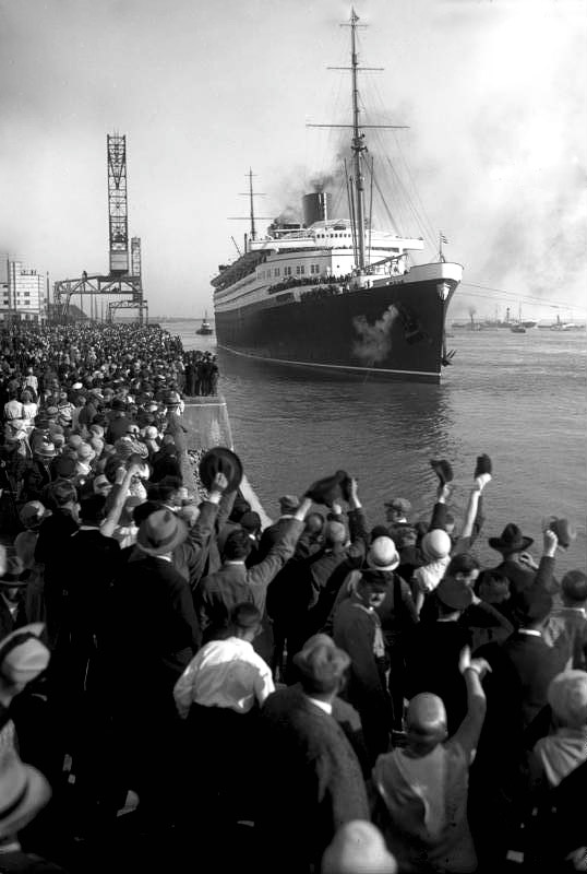 Die Jungfernreise des neuen deutschen Riesendampfers "Bremen" in Bremerhaven fand unter dem Jubel von zehntausenden von Zuschauern statt. Der Ozeanriese "Bremen" tritt unter dem Jubel der Bevölkerung seine Jungfernreise von Bremerhaven nach New York an.